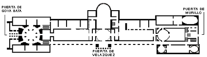 Planta original de El Museo del Prado, Madrid, actualmente tiene numerosos añadidos posteriores. Obra de Juan de Villanueva